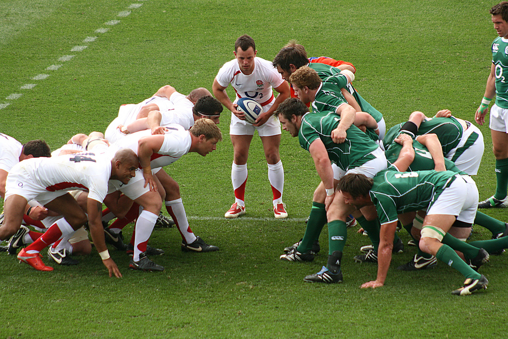 Fotografia d'una meñé de rugbi